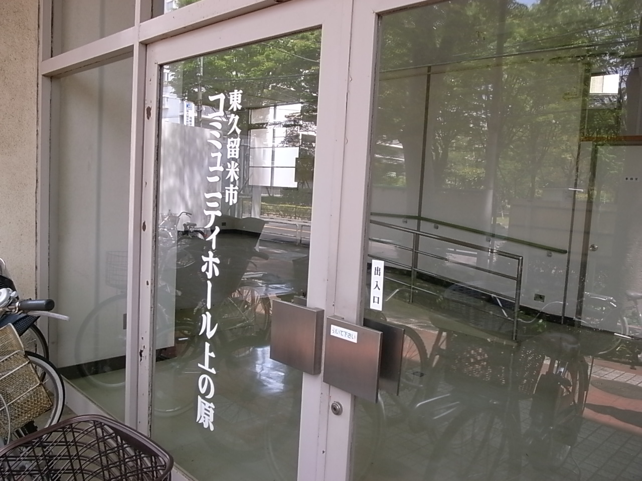 廃止になった東久留米市コミュニティホール上の原（東京都東久留米市）